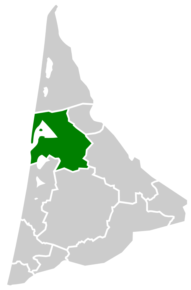 Localisation du Pays de Buch